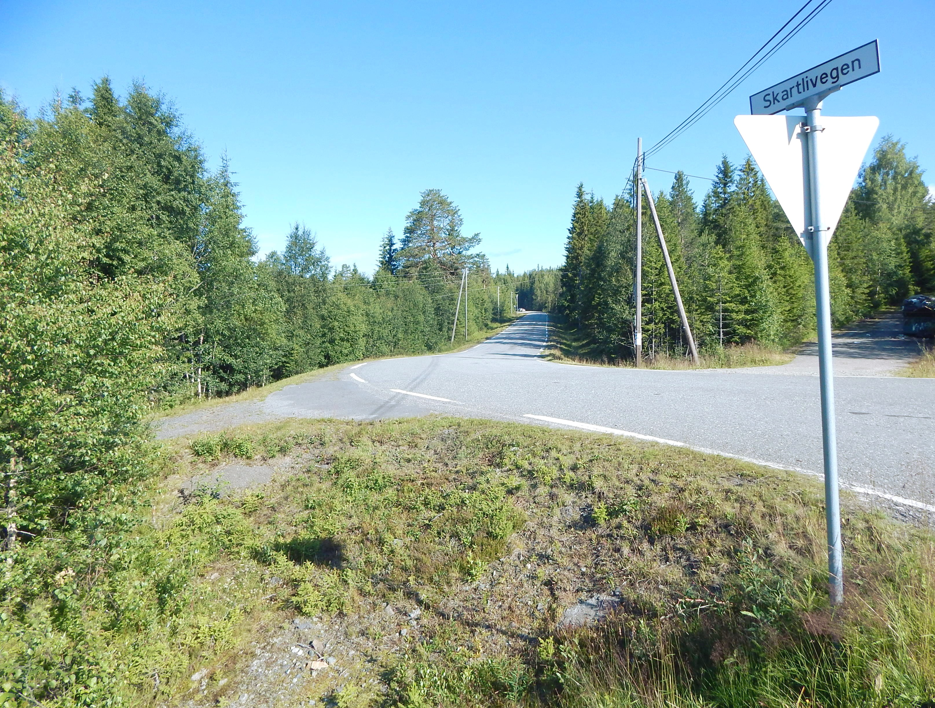 Skartlivegen (fylkesvei 2438, tidl. 199) sett fra Lillehammervegen (primær fylkesvei 250)